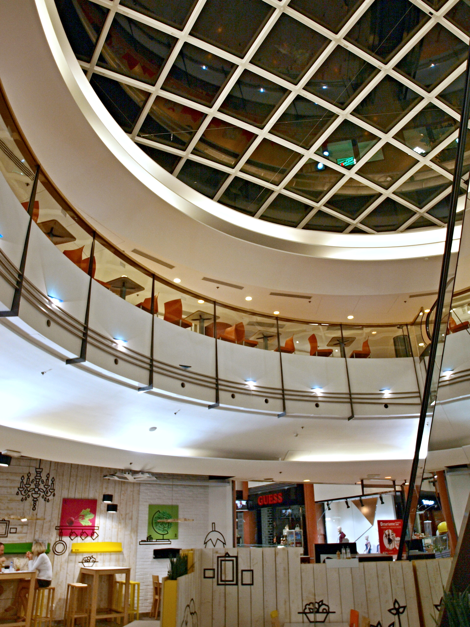 Palác Myslbek Praha